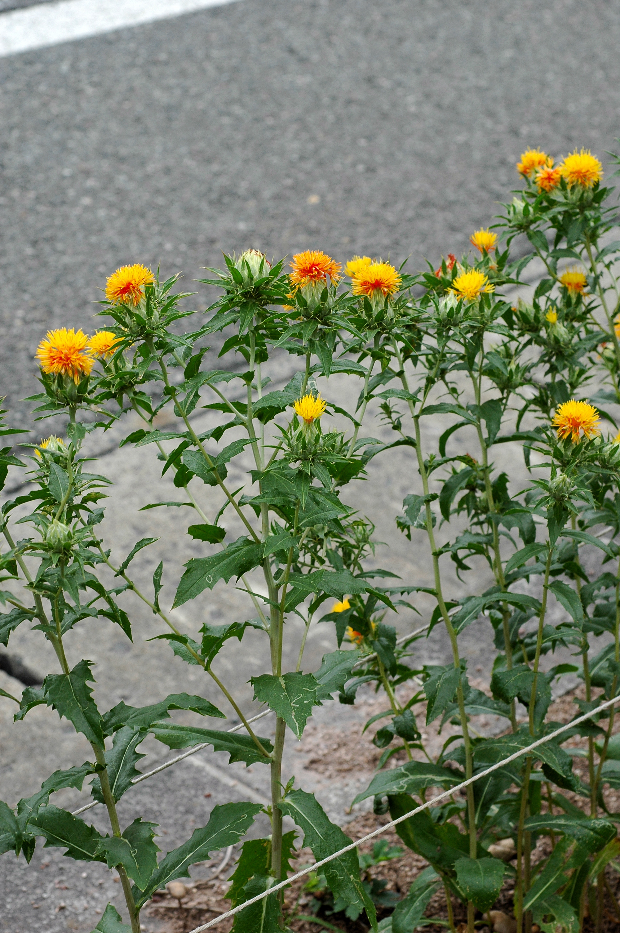 ベニバナ Carthamus tinctorius L.